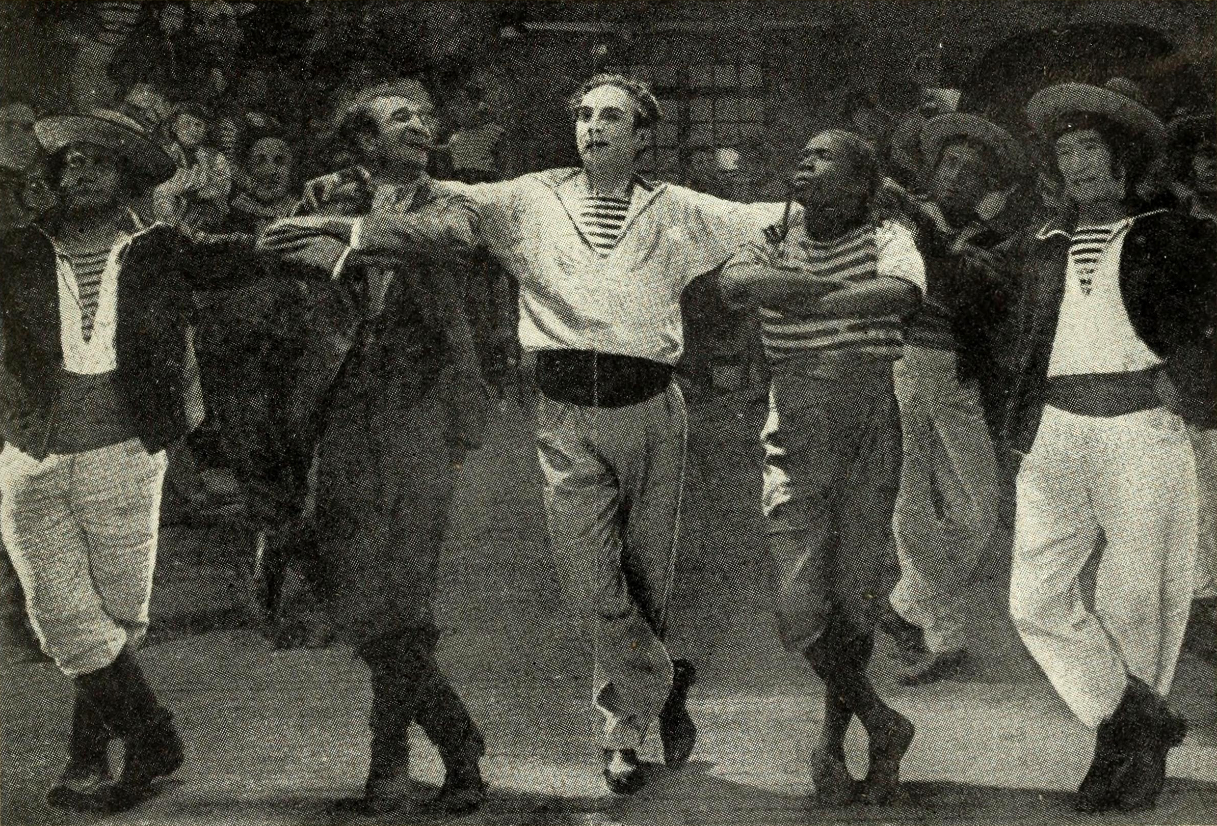 Photogramme du film. Au centre, Ivan Moskoukine.